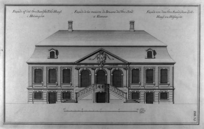 "Facade af det Öre-Sundske Told-Huus i Helsingör". Øresunds Toldkammer gengivet i Lauritz de Thurah: Den danske Vitruvius.